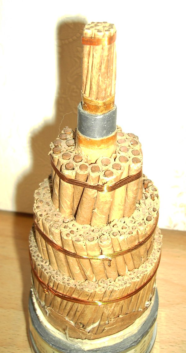 Rheinlandkabel, das erste deutsche Überlandfernsprechkabel